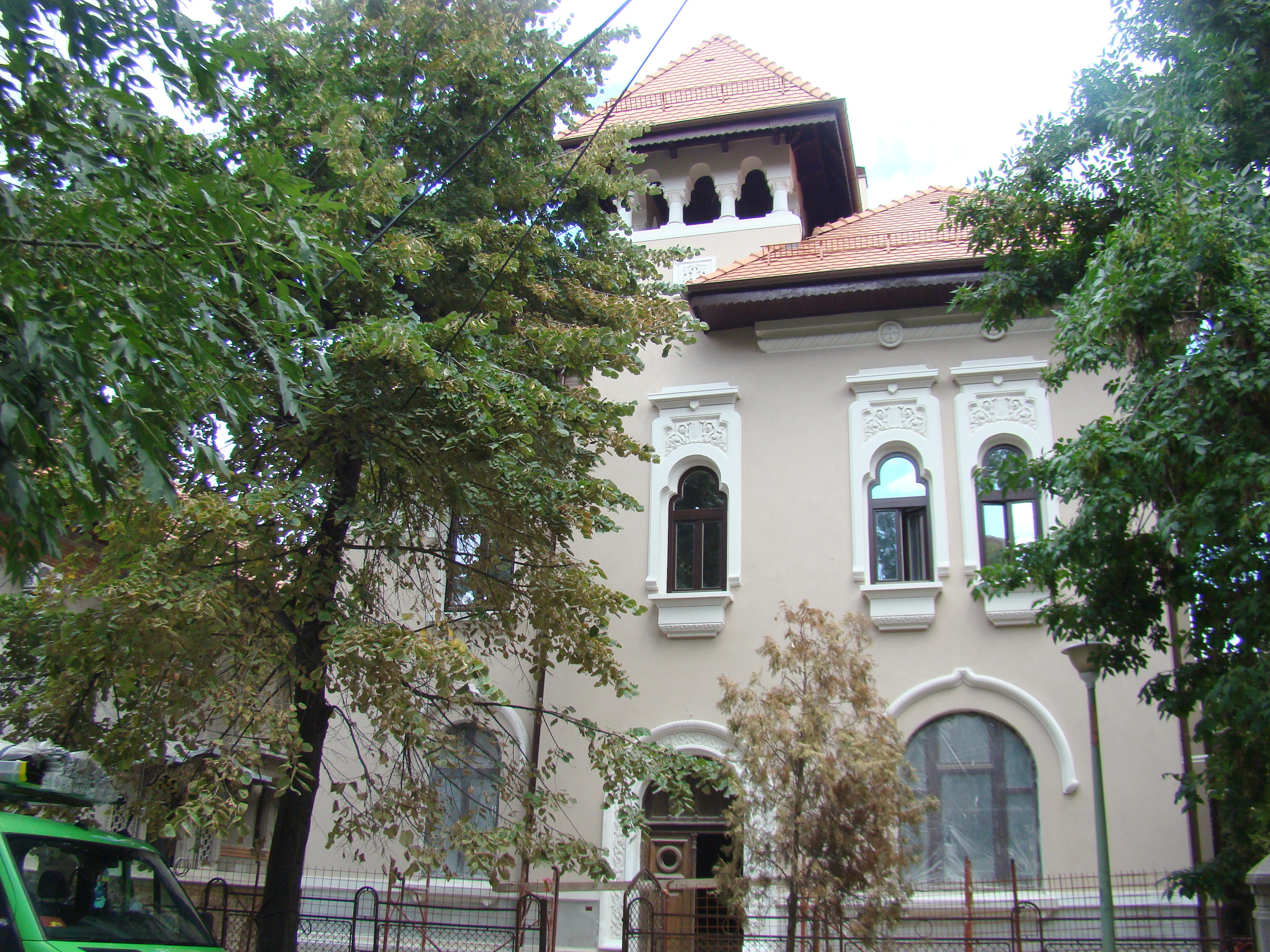 Casă monument istoric, str.Londra, nr.34